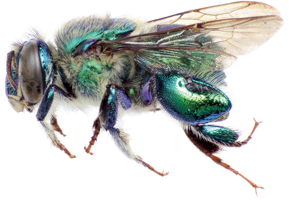 Euglossa obrima male, holotype